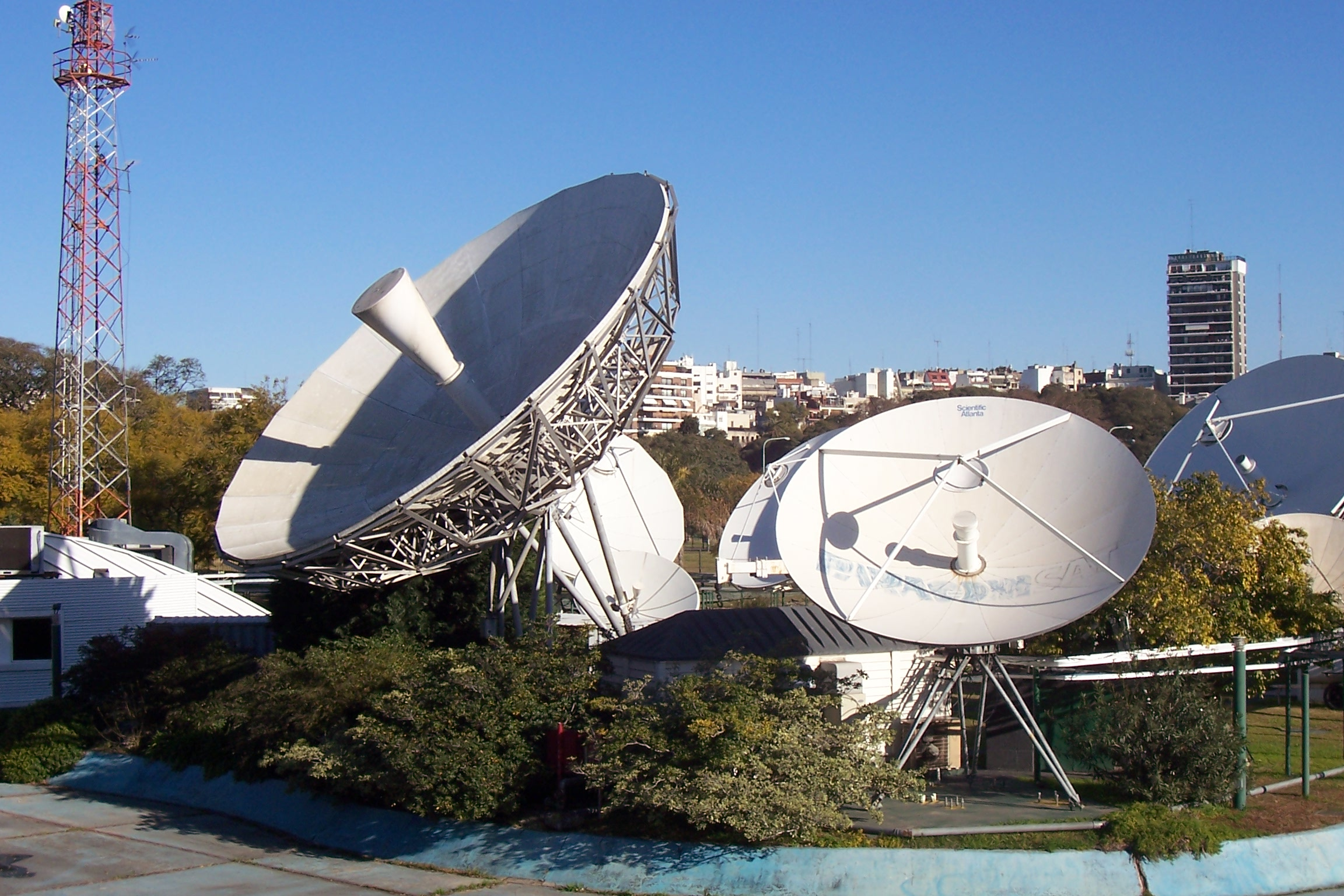 Terraza de LS 82 TV Canal 7. Buenos Aires, Argentina. Agradecimientos: Hugo Barcia, Subgerente de Relaciones Institucionales y Prensa. Canal 7 Argentina.